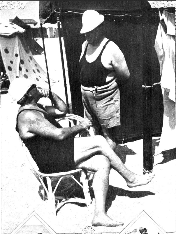 El Presidente electo Agustín P. Justo de vacaciones en la playa. A poco de asumir, toma vacaciones de verano.